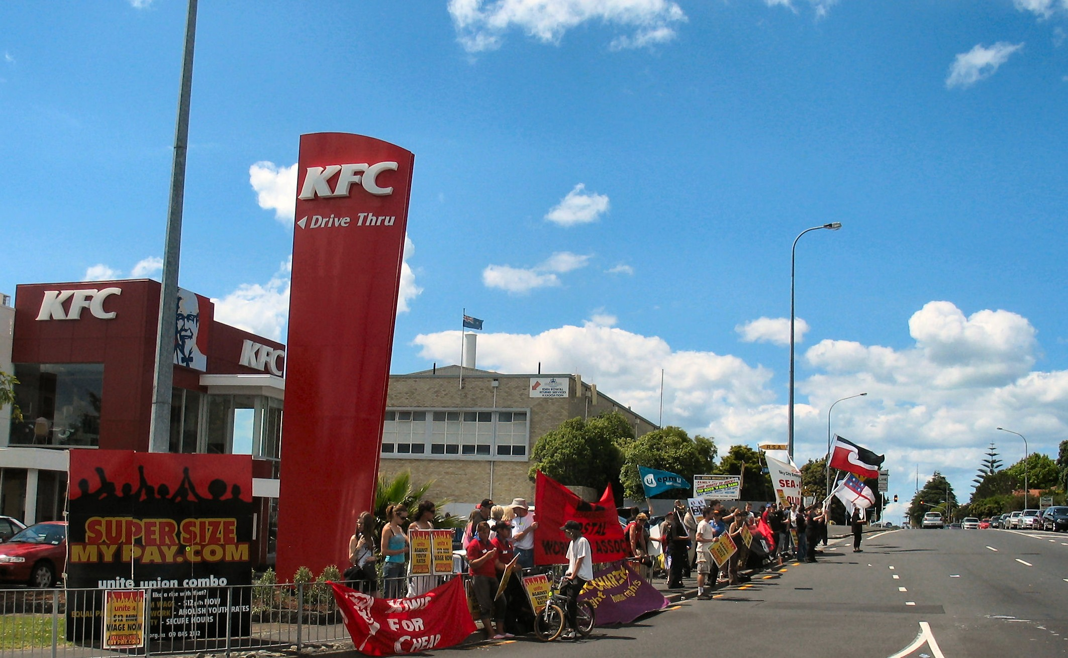 Description : Grévistes néozélandais devant un KFC à Auckland Source : Own work (Bledard 92) Photo recadrée. L'original se trouve à cette adresse : KFC Auckland Strike